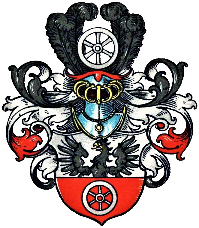 Wappen von Geismar, Westfalen Tafel 139 2 aus dem Wappenbuch des Westfälischen Adels, Band 2 Date / Datum: 1901/1903 Author / Urheber: Max von Spießen, Wappenzeichnungen: Adolf Matthias Hildebrandt